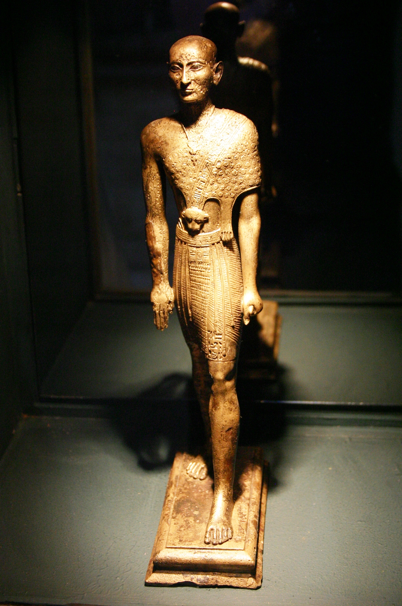 Sacerdote egípcio.